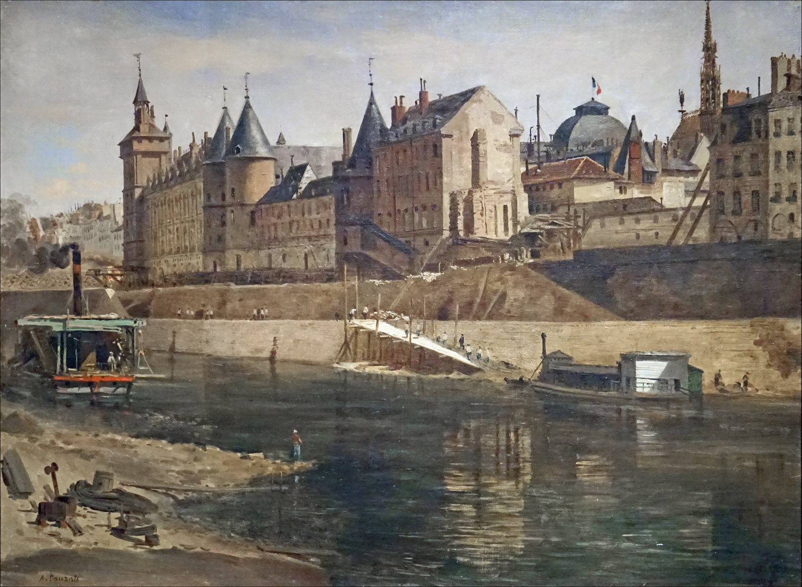 La Conciergerie pendant les travaux de reconstruction du Palais de Justice et vue du quai de l'Horloge Oeuvre d'Adrien Dauzats (1804-1868) environ 1857 Huile sur toile Collection du musée Carnavalet, Paris Peinture présentée dans l'exposition "Viollet-le-Duc, les visions d'un architecte" Cité de l'architecture et du patrimoine